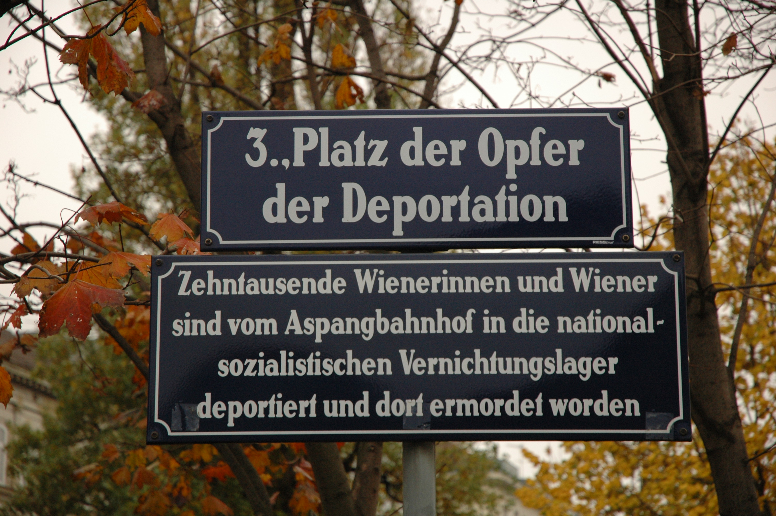 Straßenschild am "Platz der Opfer der Deportation" am ehemaligen Aspangbahnhof in Wien-Landstraße